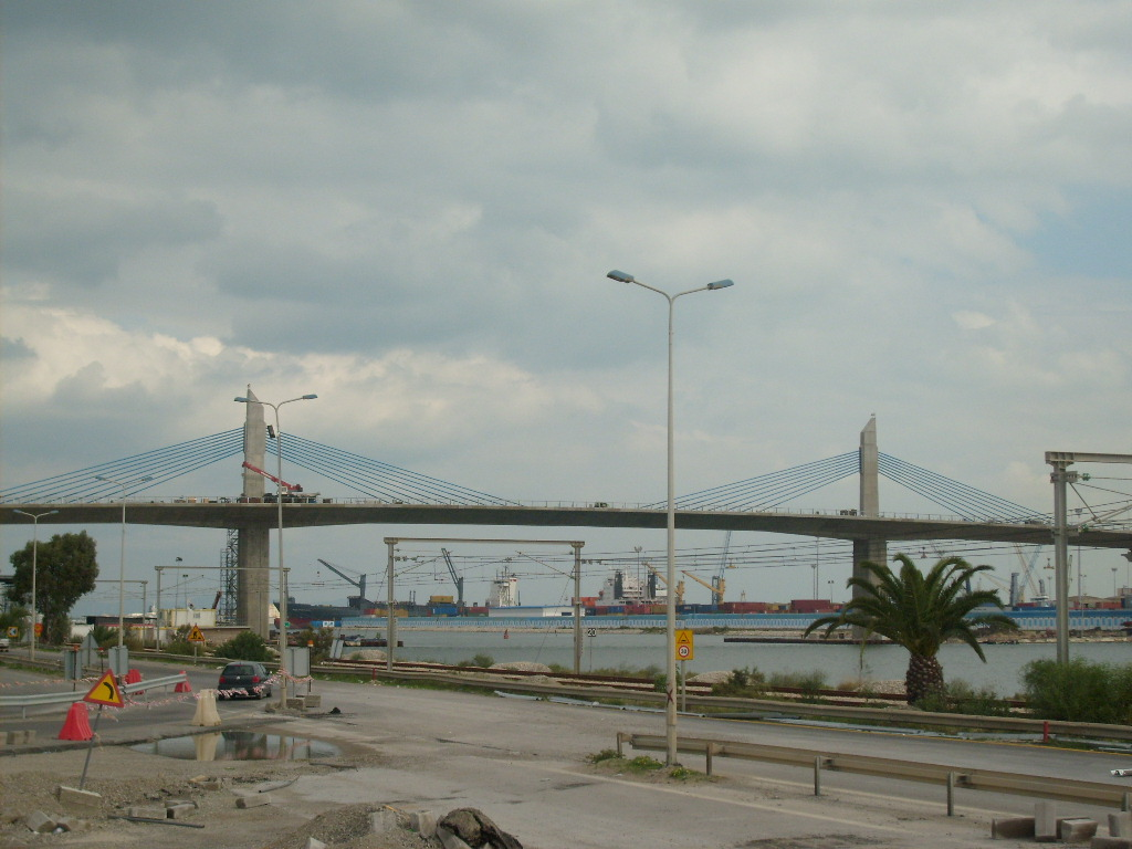 Vue du pont Radès-La Goulette en construction (octobre 2008)